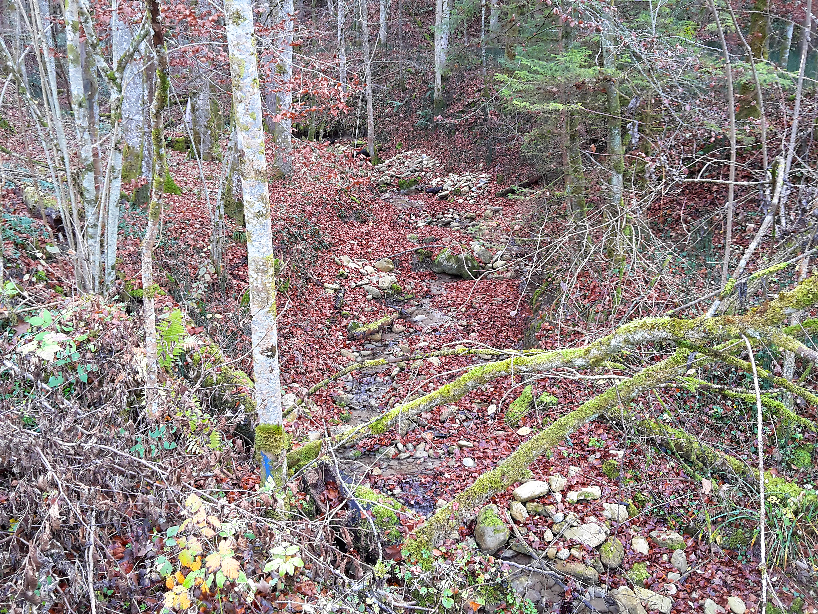 Mülitobelbach kurz vor der Mündung vor Unterquerung der Talstrasse Mitte